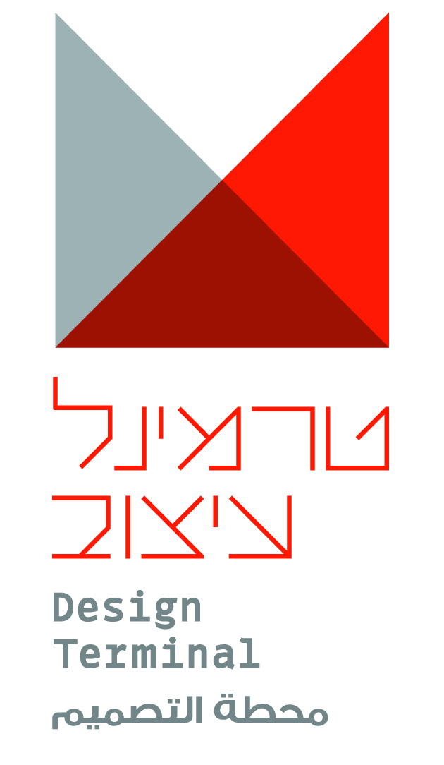 לוגו טרמינל עיצוב